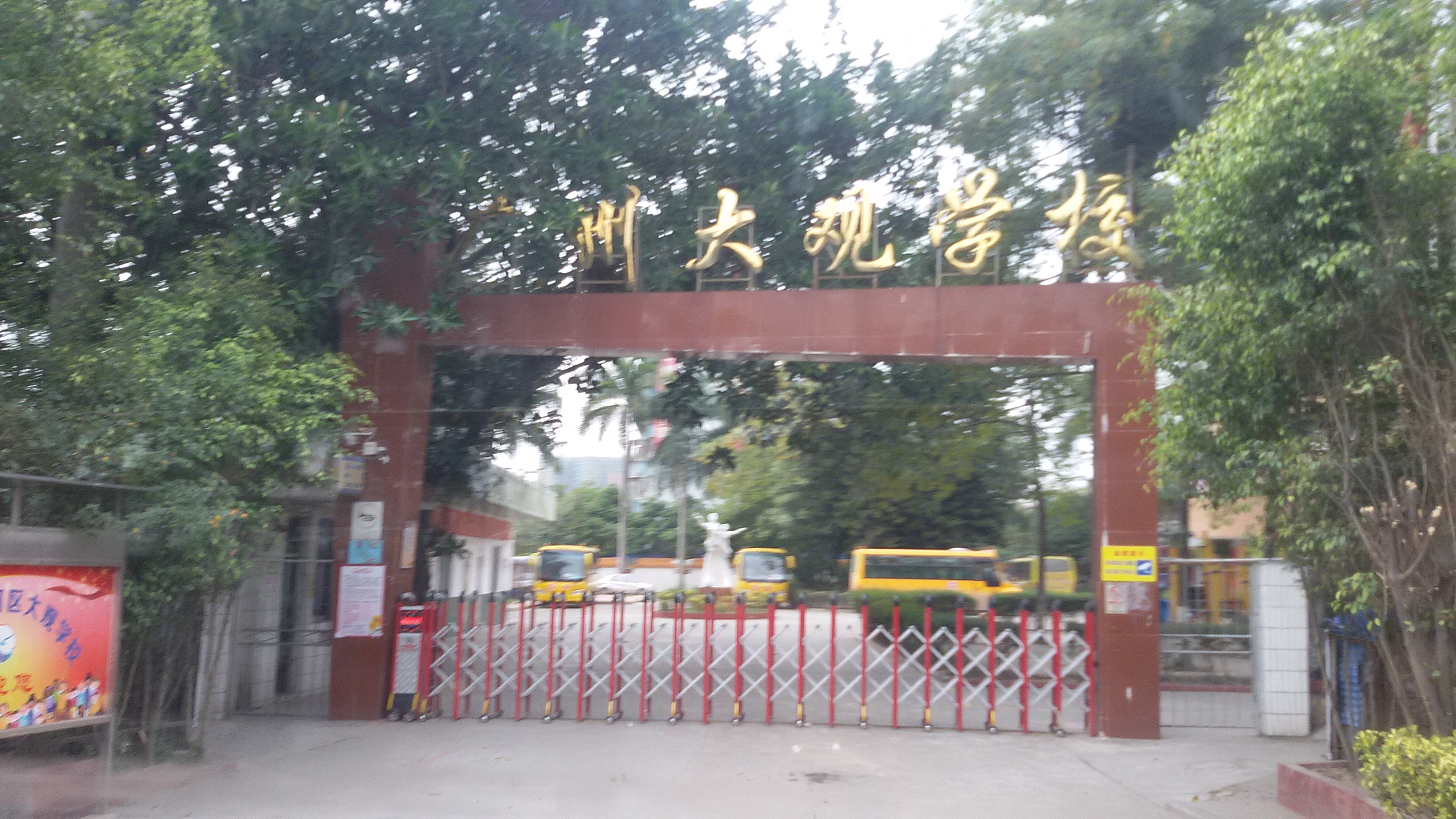 粵語: 廣州大觀學校